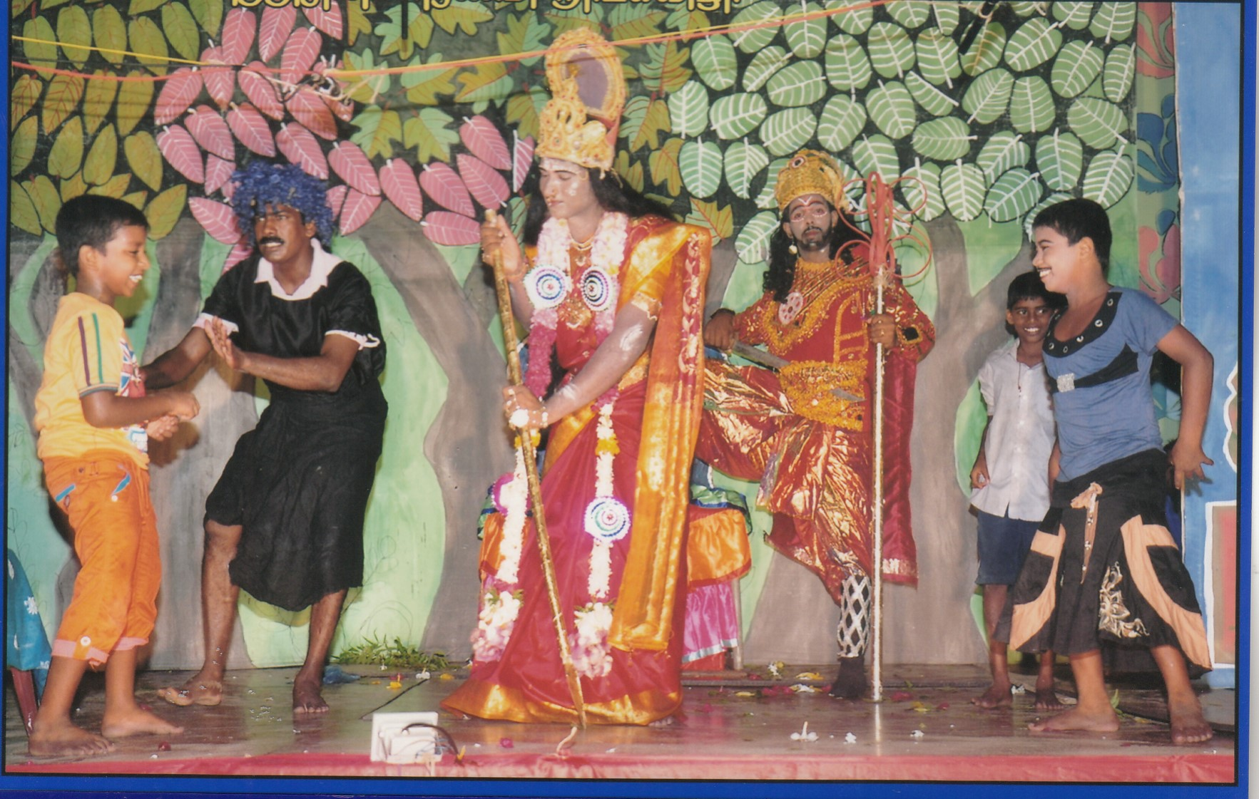 காத்தவராயன் சிந்துநடைக் கூத்து